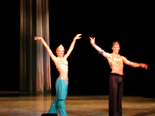 Твор-й вечер М. Вежновец и Ю. Ковалёва. "Шехерезада"